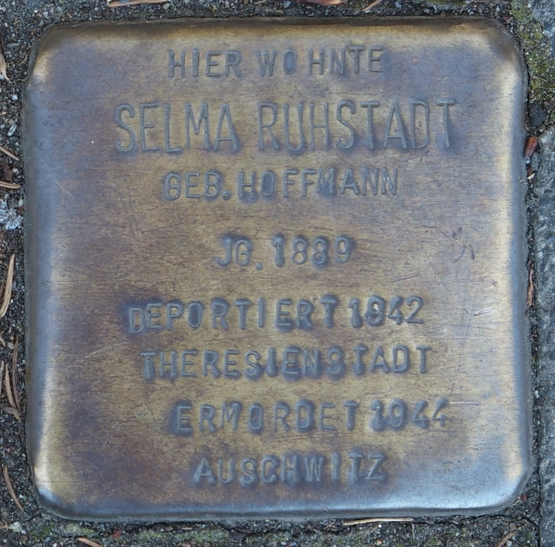 Stolperstein in Soest Westenhellweg 2-4, Selma Ruhstadt